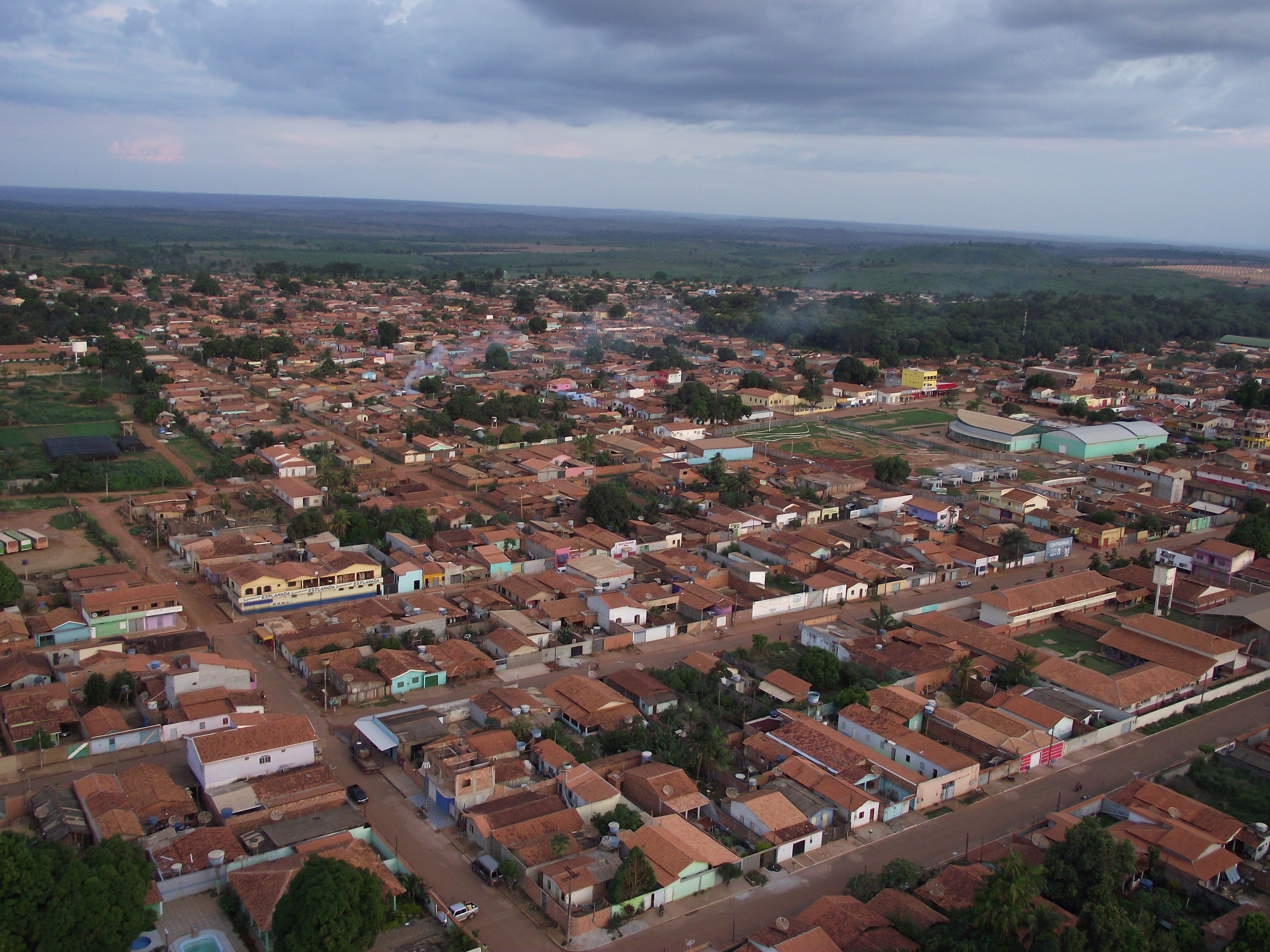 Foto aérea obtida do topo de uma torre de telecomunicações na cidade de Dom Eliseu